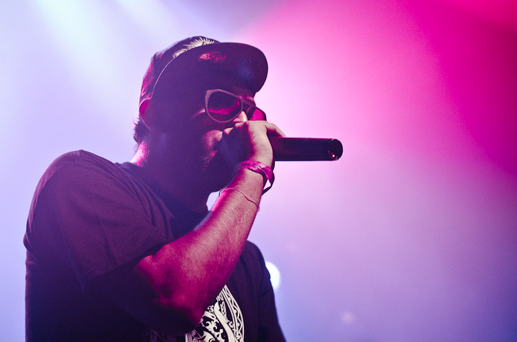 Grito Rock Buenos Aires en Niceto Pub